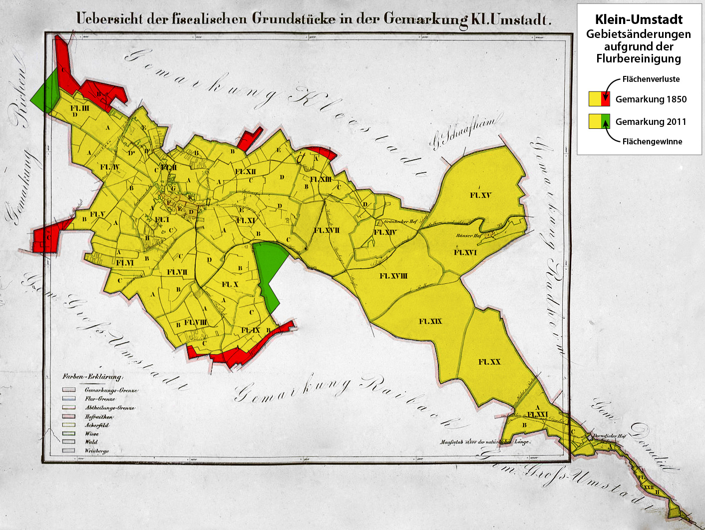 Änderungen der Gemarkungsgrenzen von Klein-Umstadt aufgrund der Flurbereinigung zwischen 1850 und 2010